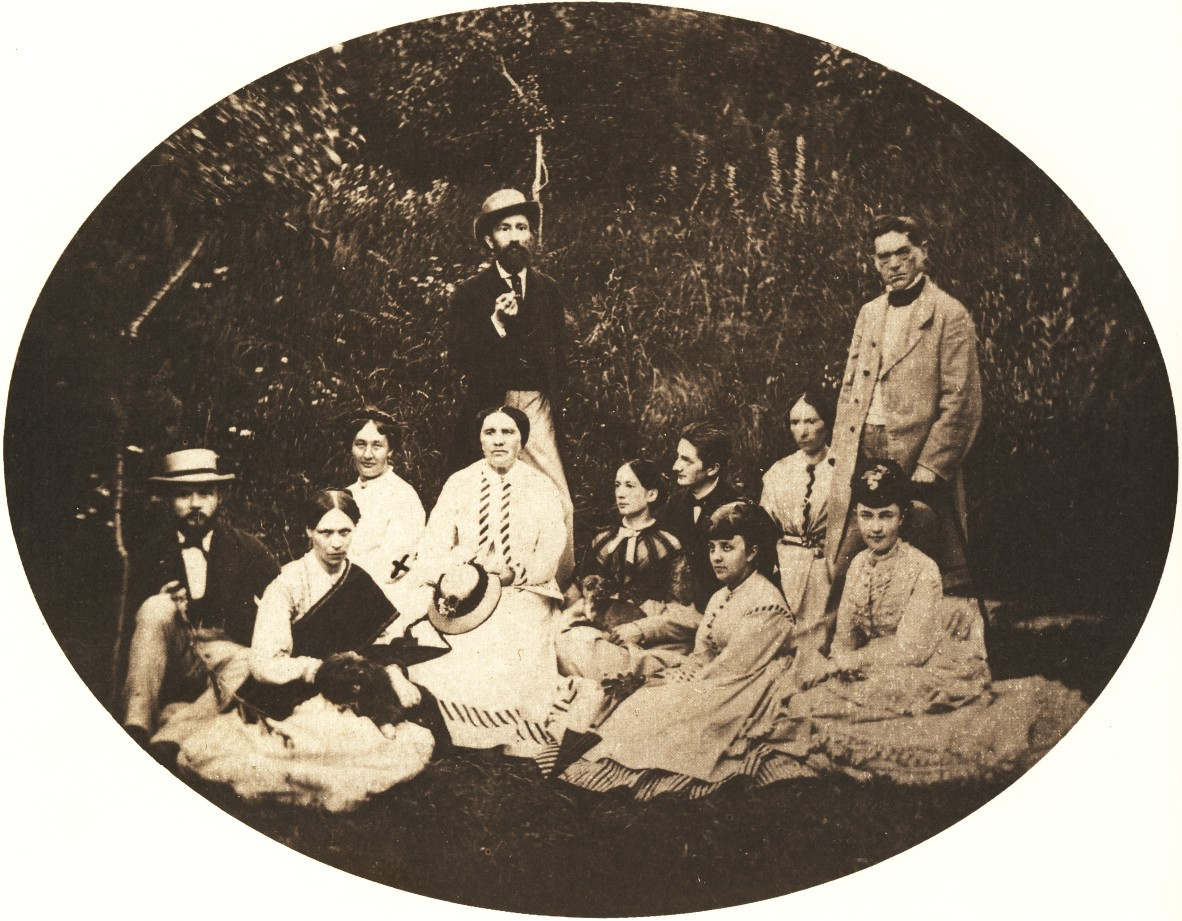 Gruppenbild: Links stehend der Dichter Moritz Heydrich, rechts stehend der Berliner Hofkapellmeister Heinrich Dorn.